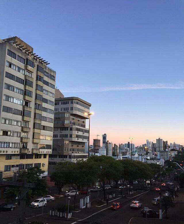 região central de Chapecó.